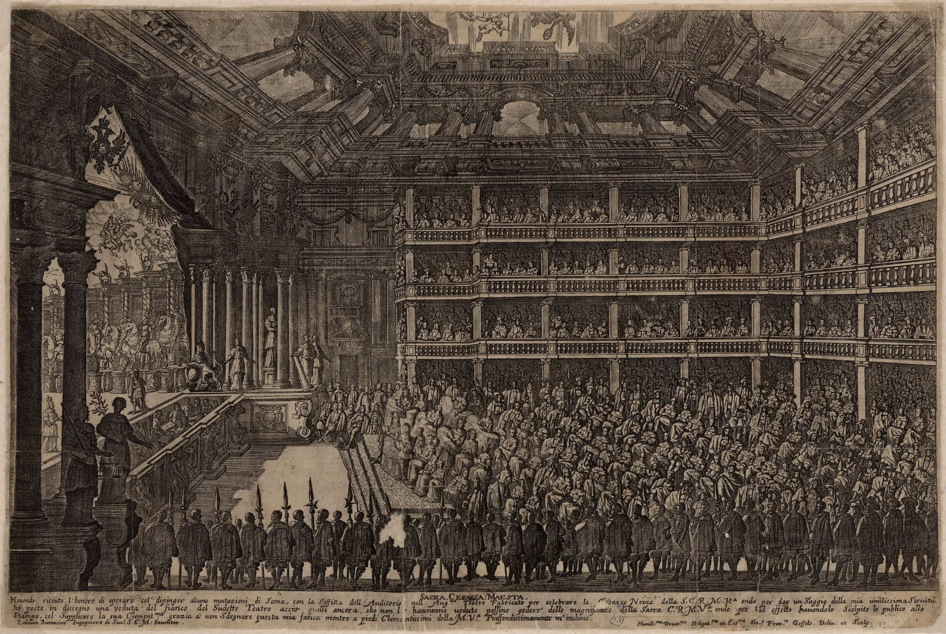 Vista del teatro construido por Lodovico Ottavio Burnacini en Viena con motivo de la boda del emperador Leopoldo I con la infanta Margarita. Grabado de Frans Geffels dedicado a la "Sacra Cesarea Maesta", firmado "Lodovico Buornacino Ingegniero di sua S: C: M. Inventor // Franº Geffels Delin: et Scolp: ". El grabado se publicó al frente de la obra de Francisco Sbarra, "Il pomo d'oro. Festa teatrale rappresentata in Vienna per l'augustissime noze delle Sacre Cesaree e Reali Maestà di Leopoldo e Margherita", Viena, 1668. Ópera musicada por Antonio Cesti.